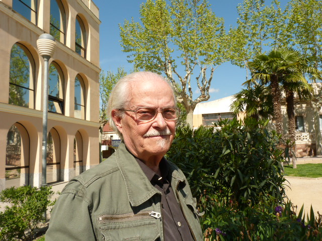 Mac 2014